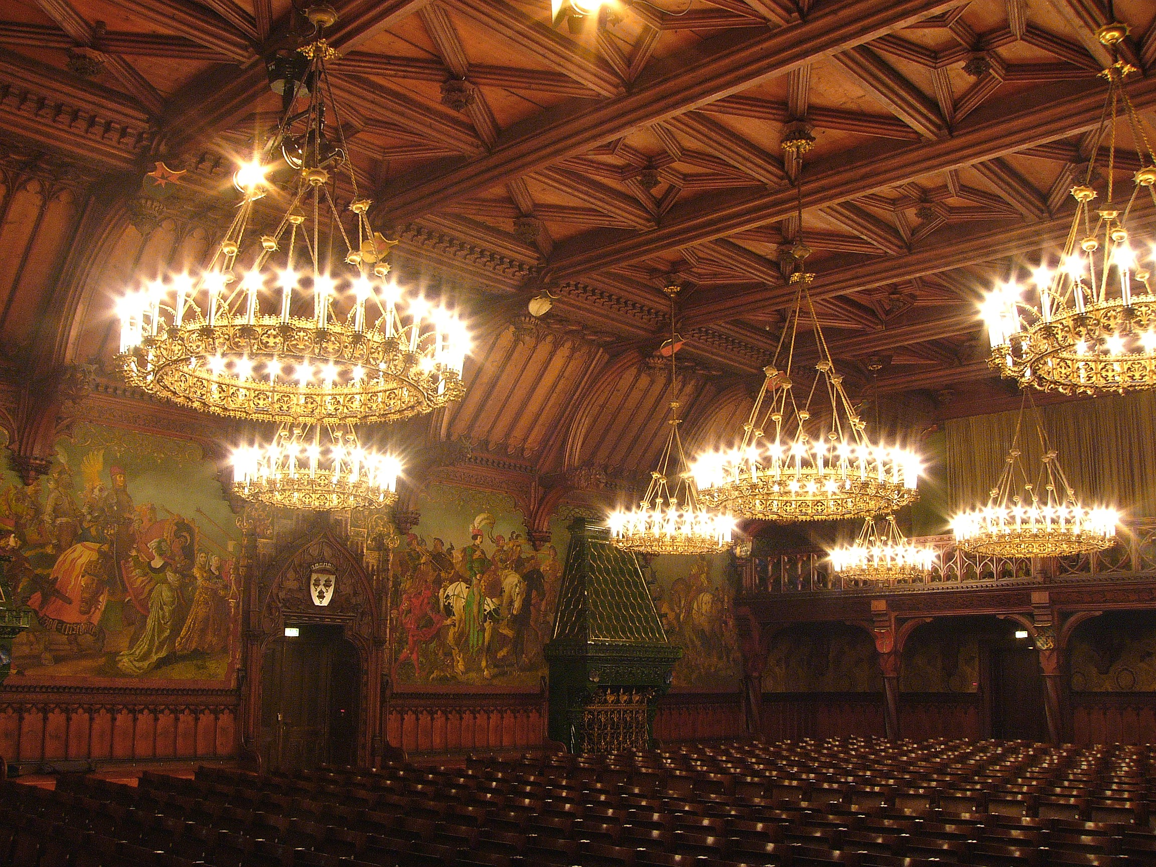 Prunksaal im Rathaus von Landshut. An den Wänden Szenen aus der Fürstenhochzeit von 1475.This is a photograph of an architectural monument.